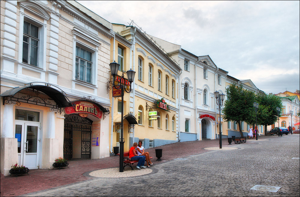 Віцебскія краявіды